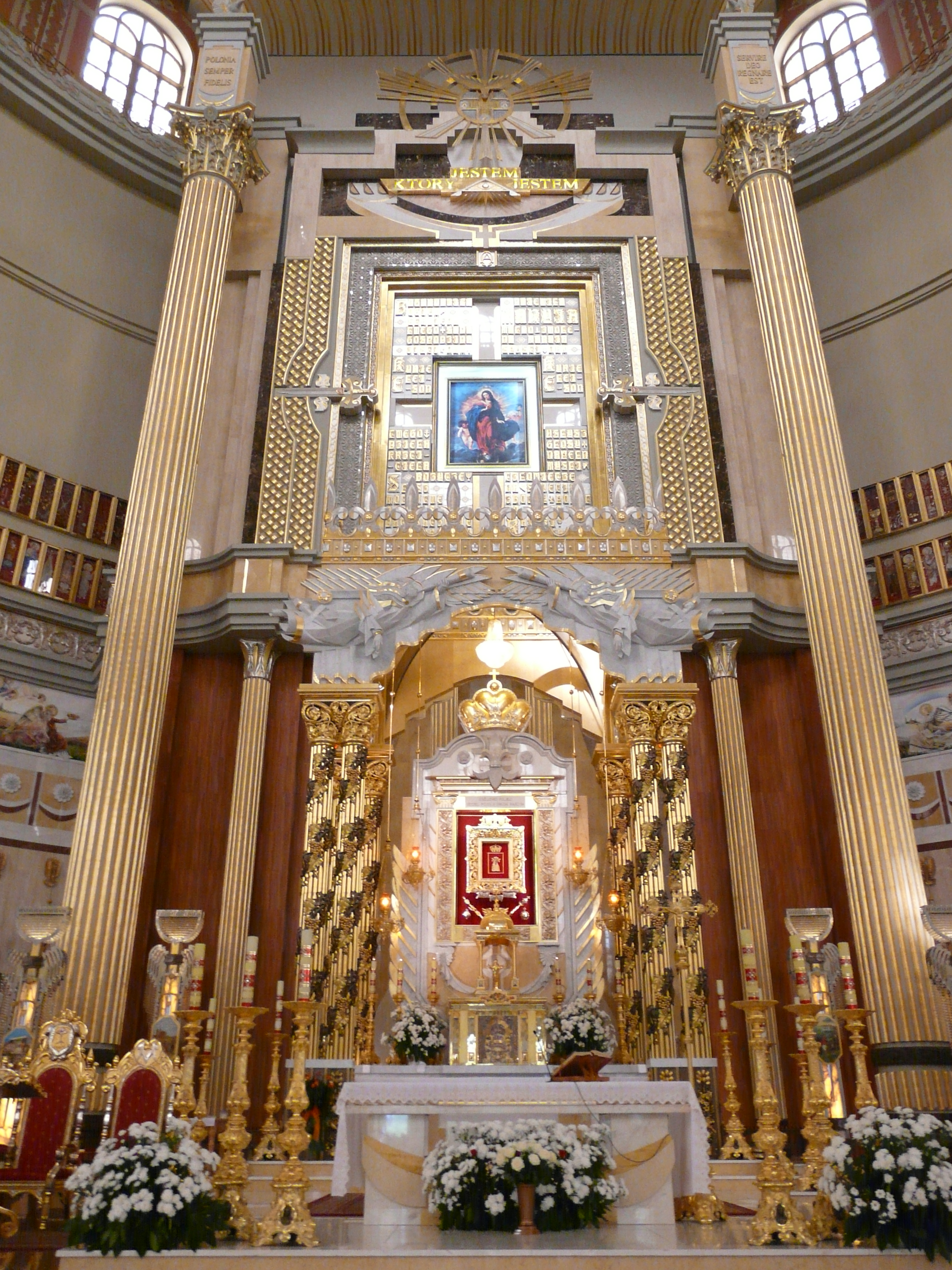 Licheń